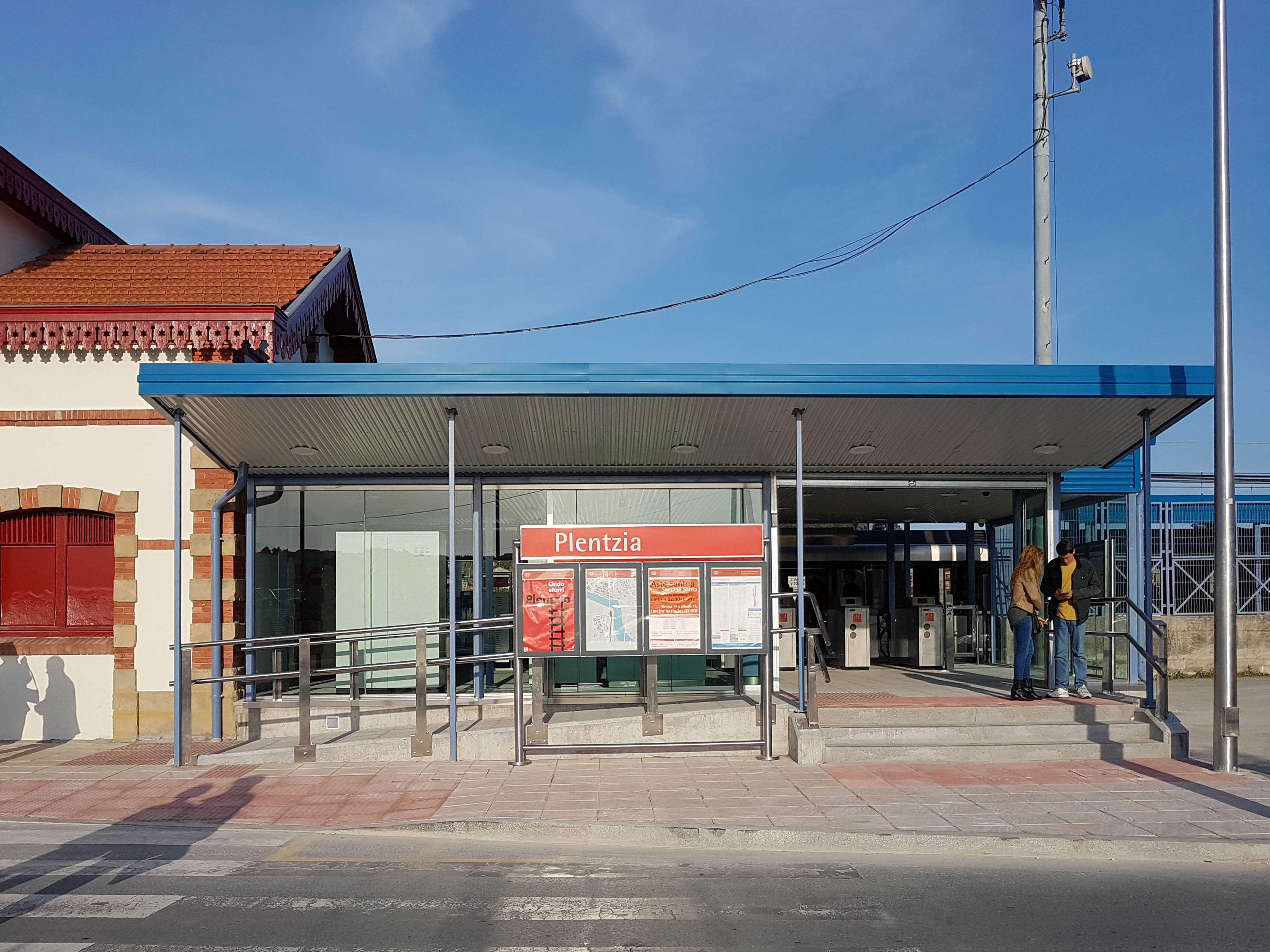 Estación de Plentzia.